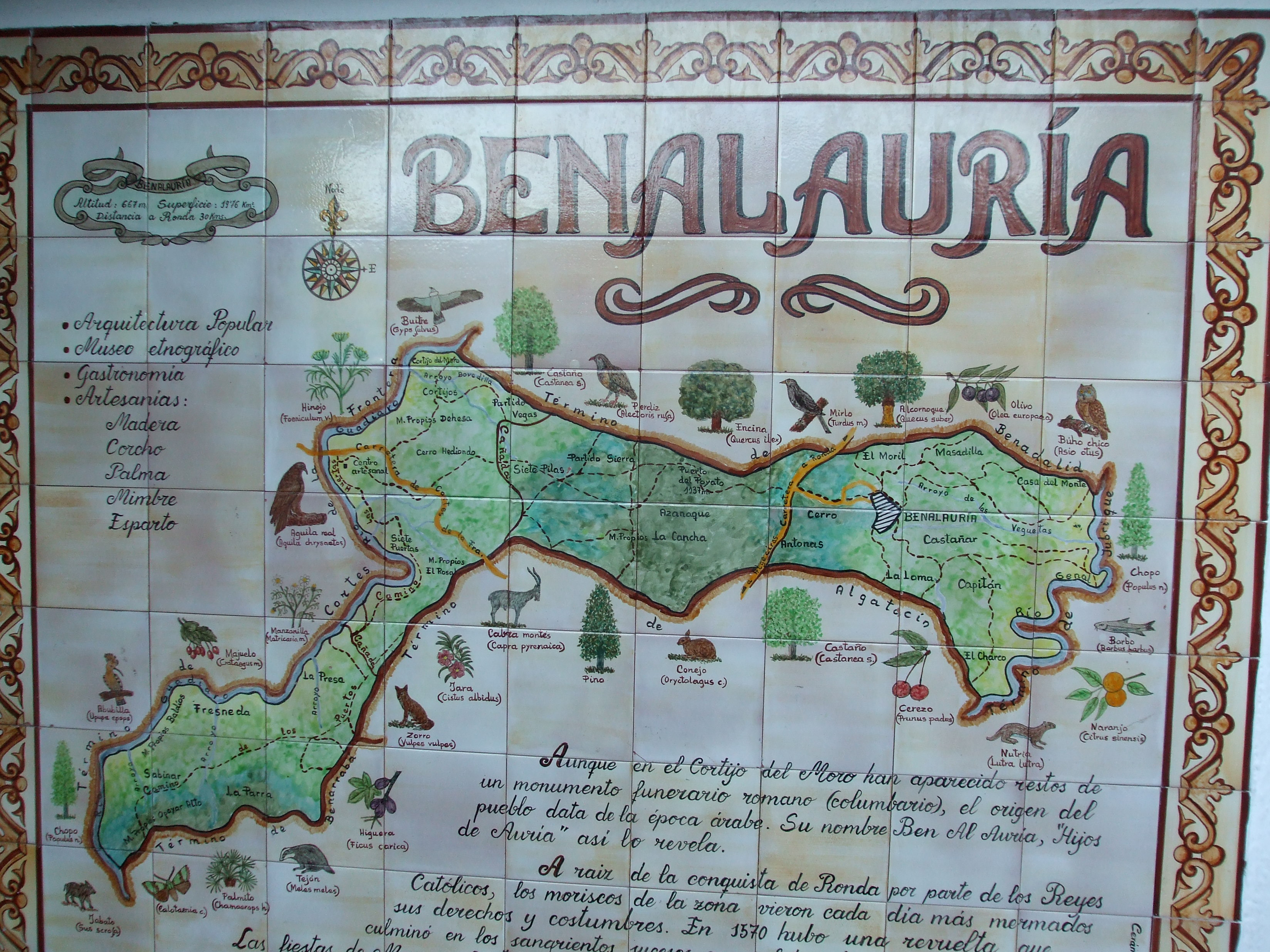 azulejo del pueblo de benalauria